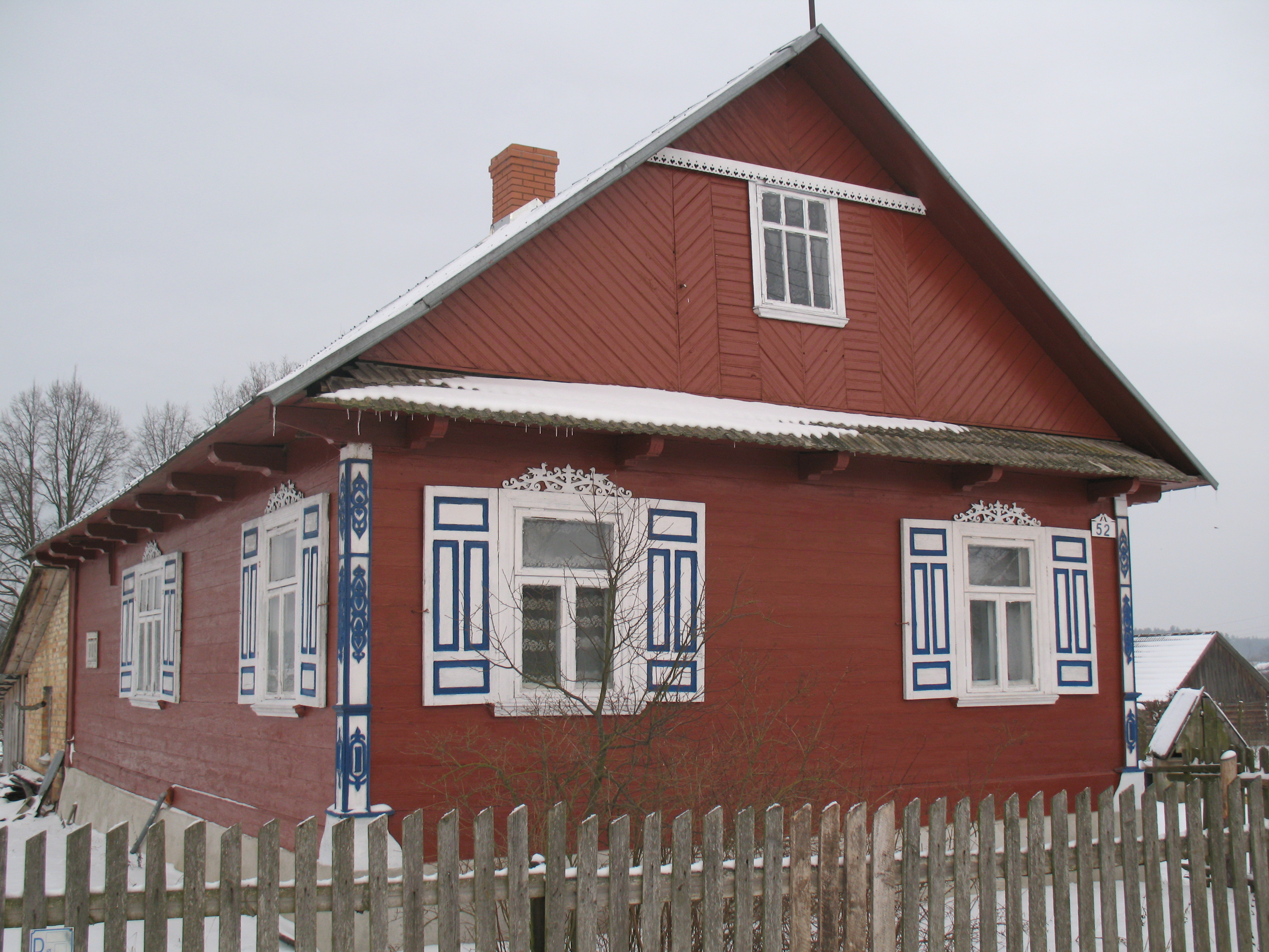 Dom w północnej części wsi Soce.